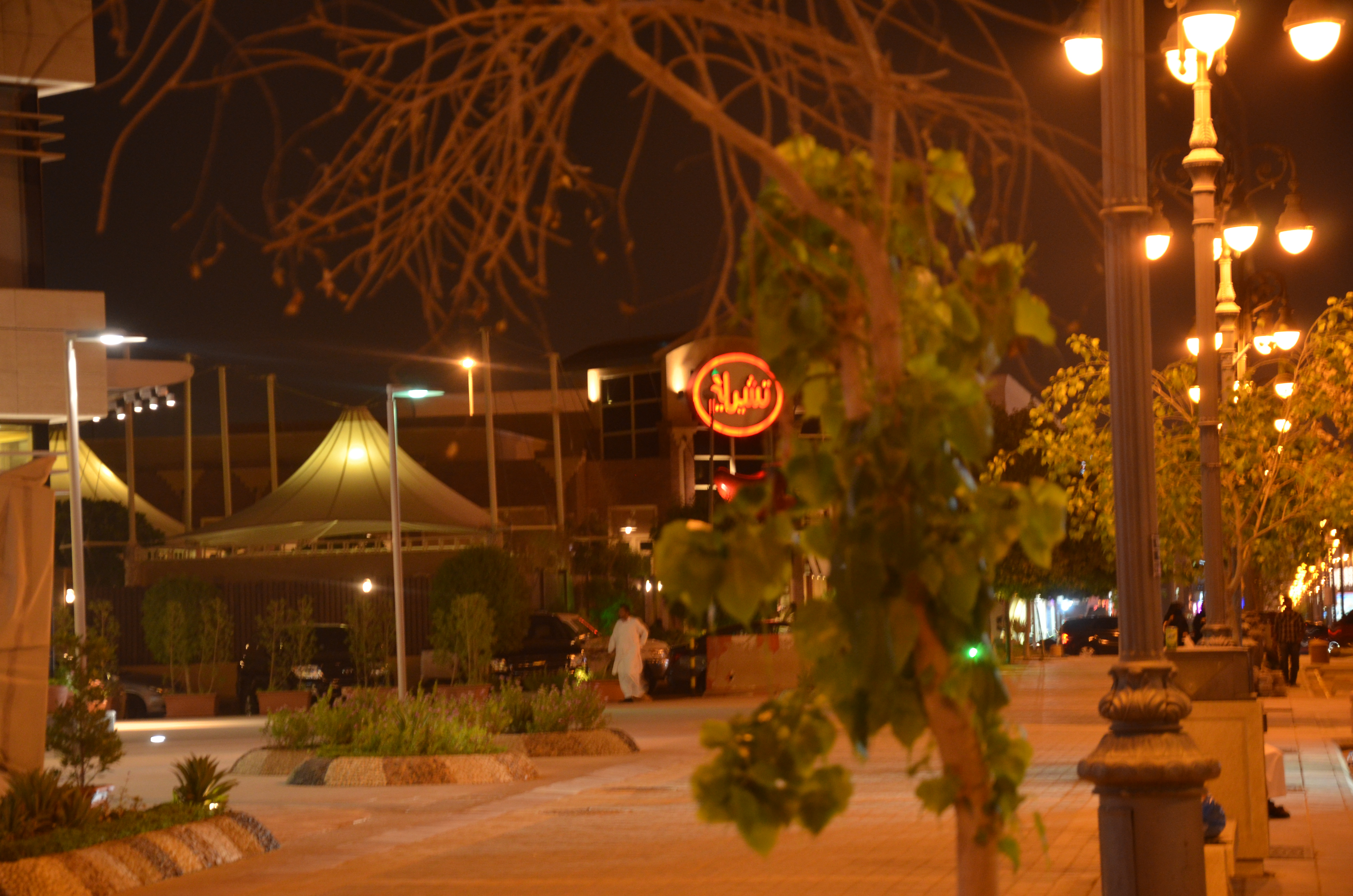 شارع التحلية (الرياض 2012) يقدم المأكولات الأمريكية والمكسيكية والإيطالية.